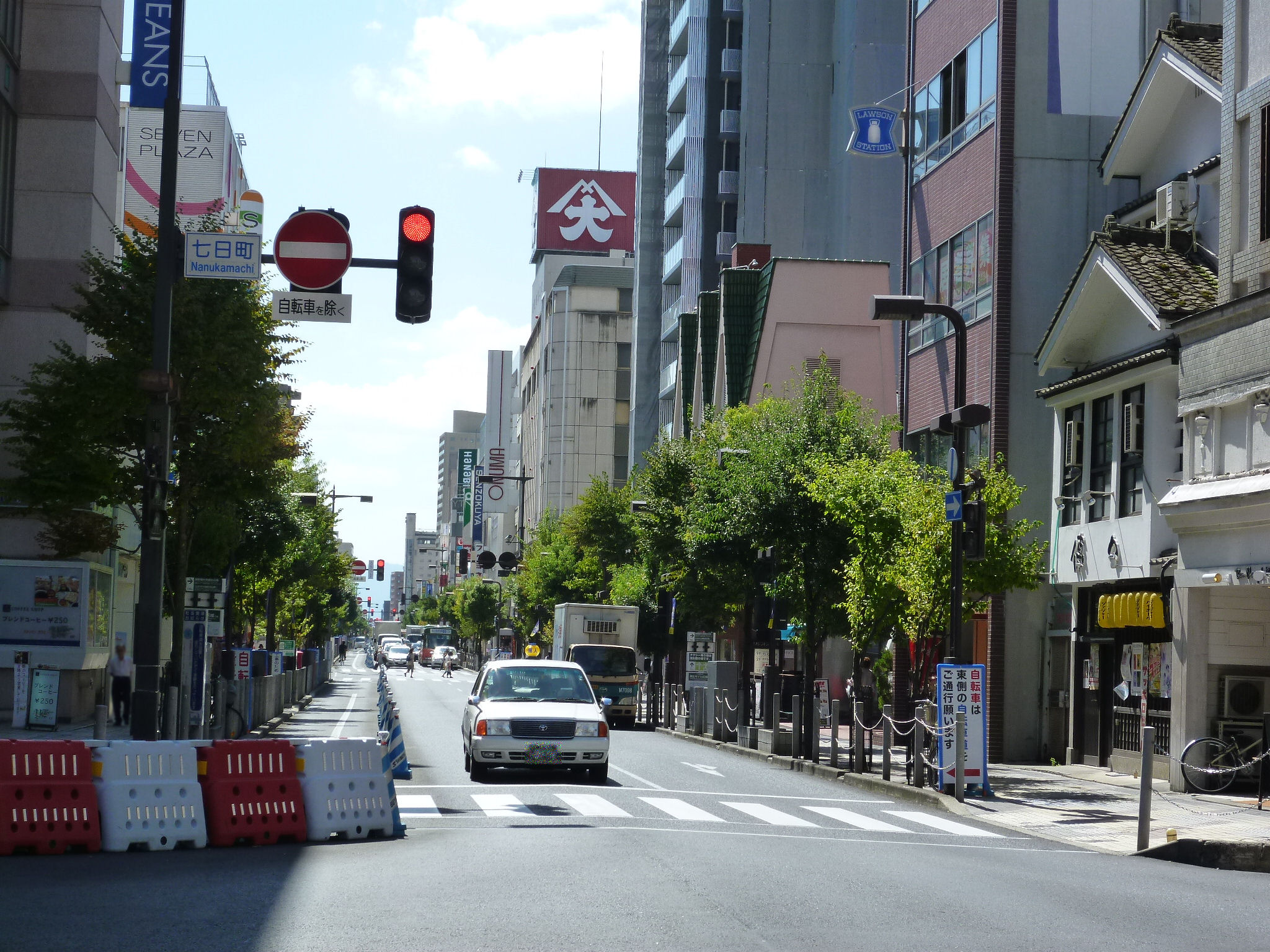 山形県山形市の七日町商店街。中央の通りは国道112号（この付近の通称は七日町通り、または七日町大通り）。七日町交差点から南方向を望む。